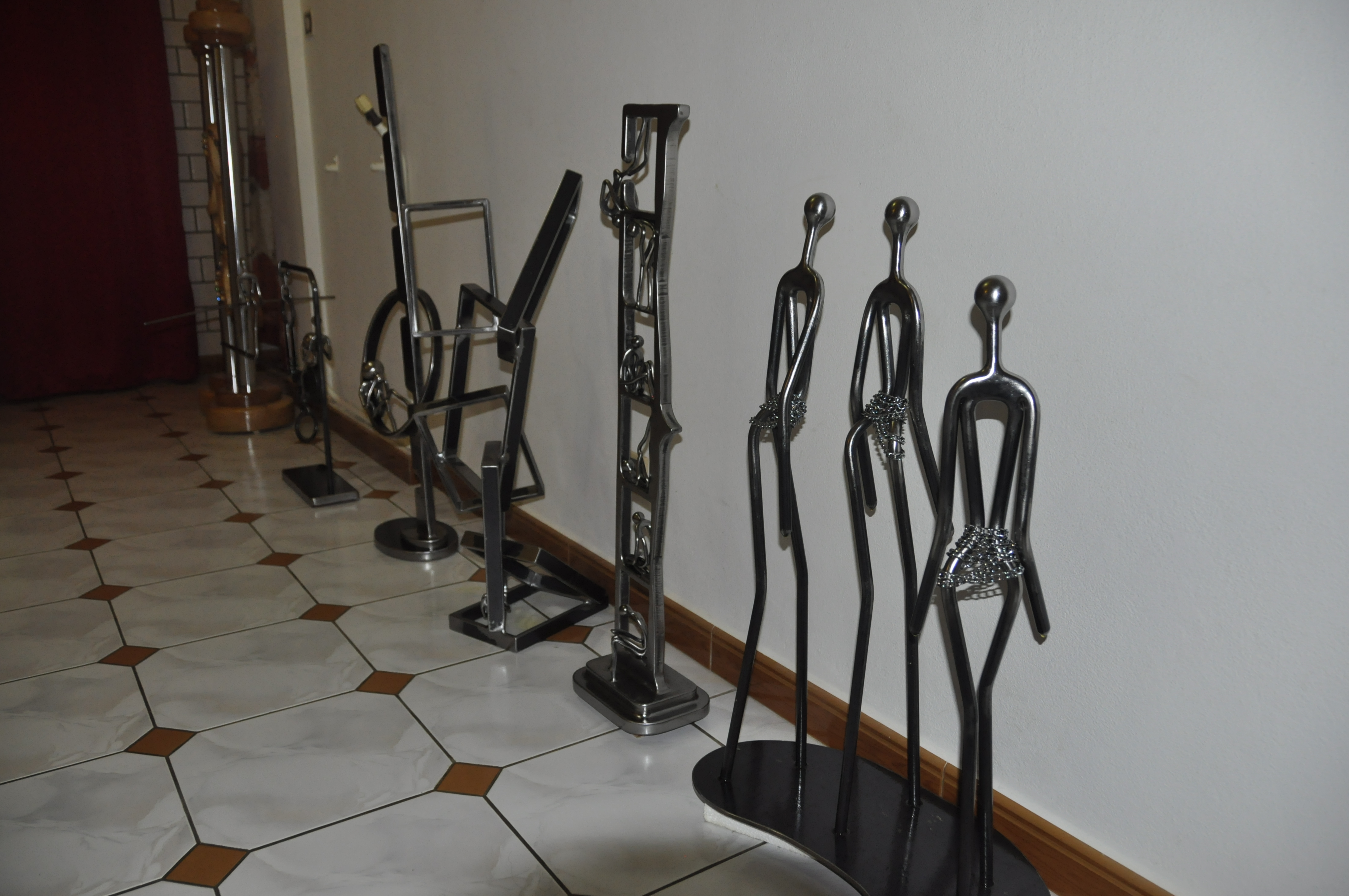 réception chez le grand sculpteur de Batna Rachid Mouffouk